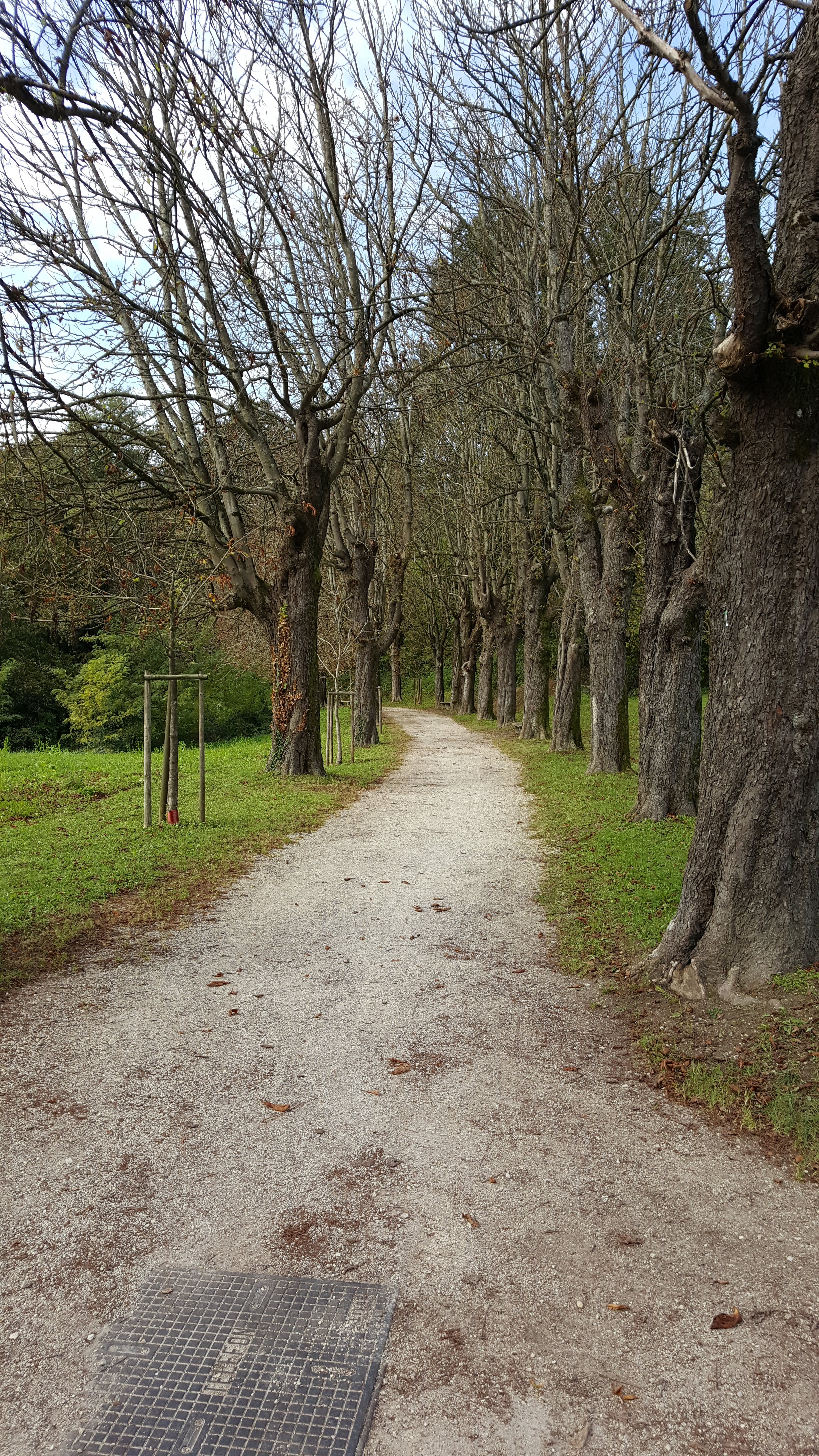 Pot v drevoredu